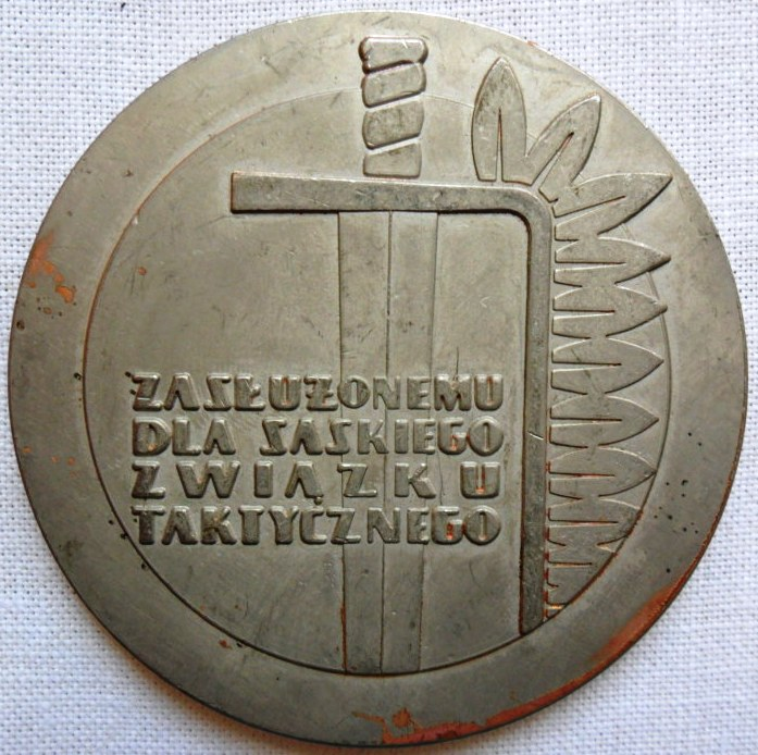 Medal pamiątkowy